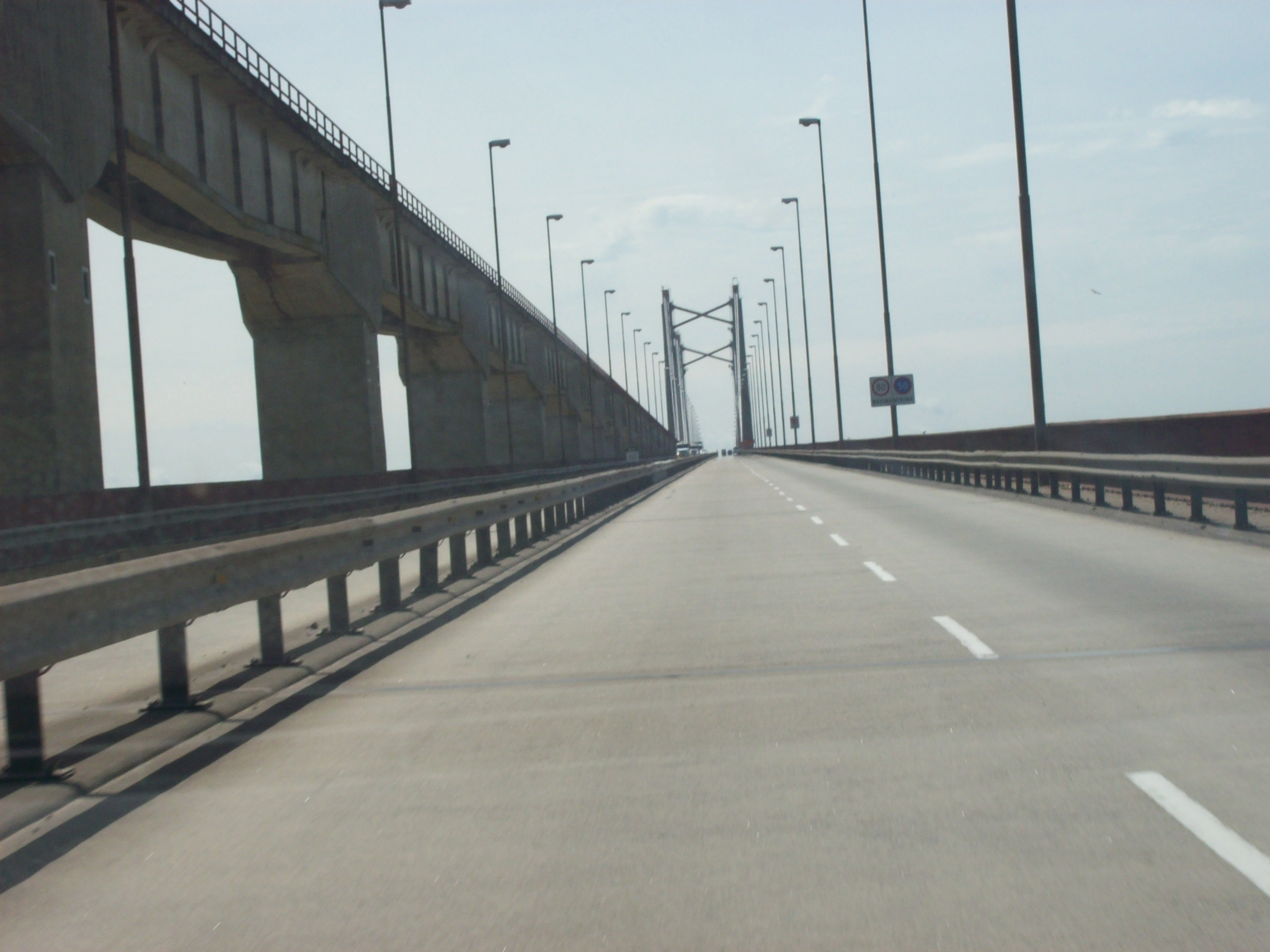 Urquiza Bridge over Paraná Guazú river, in Buenos Aires - Entre Ríos border, Argentina